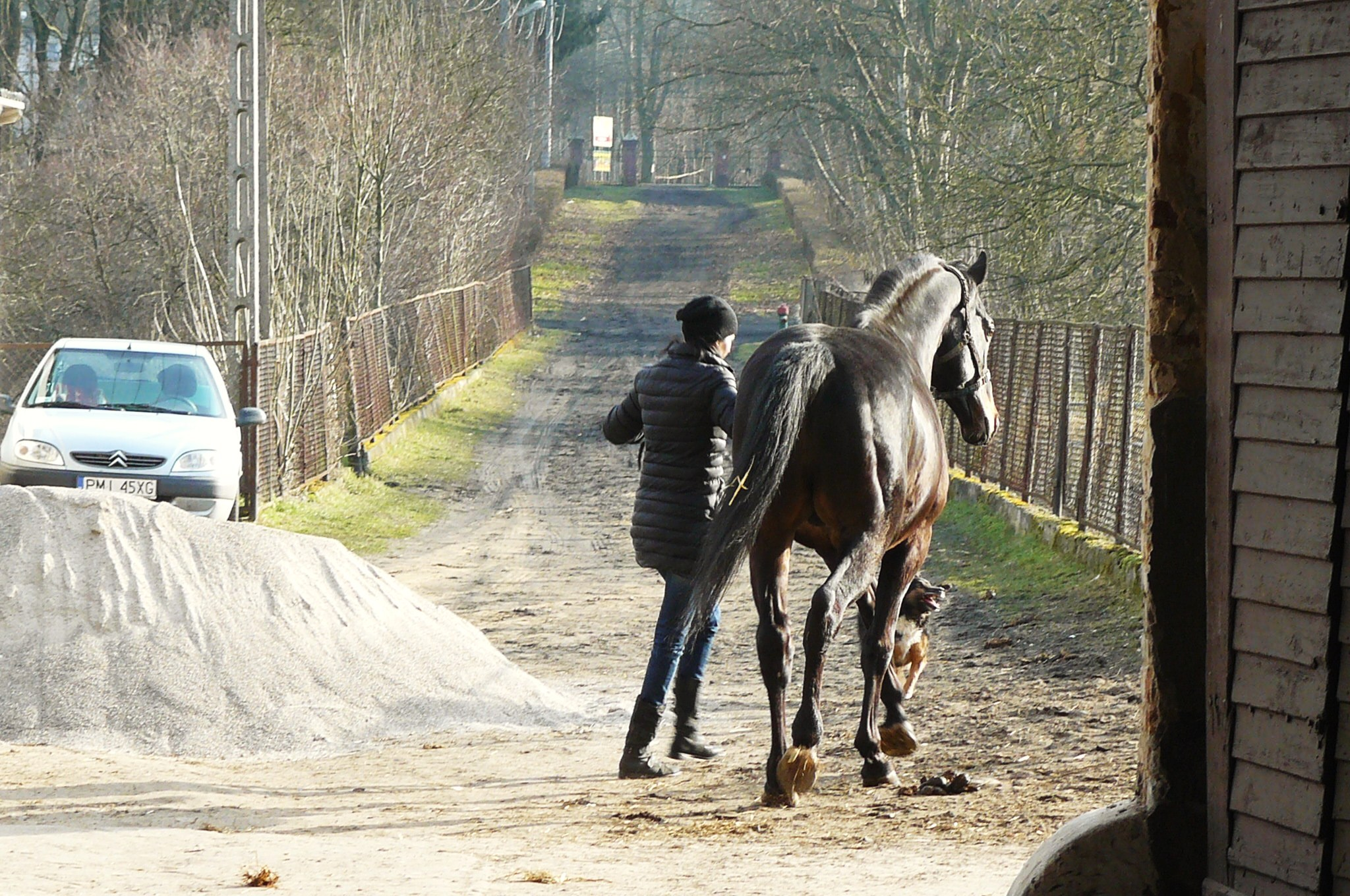 Stadnina ogierów w Sierakowie.